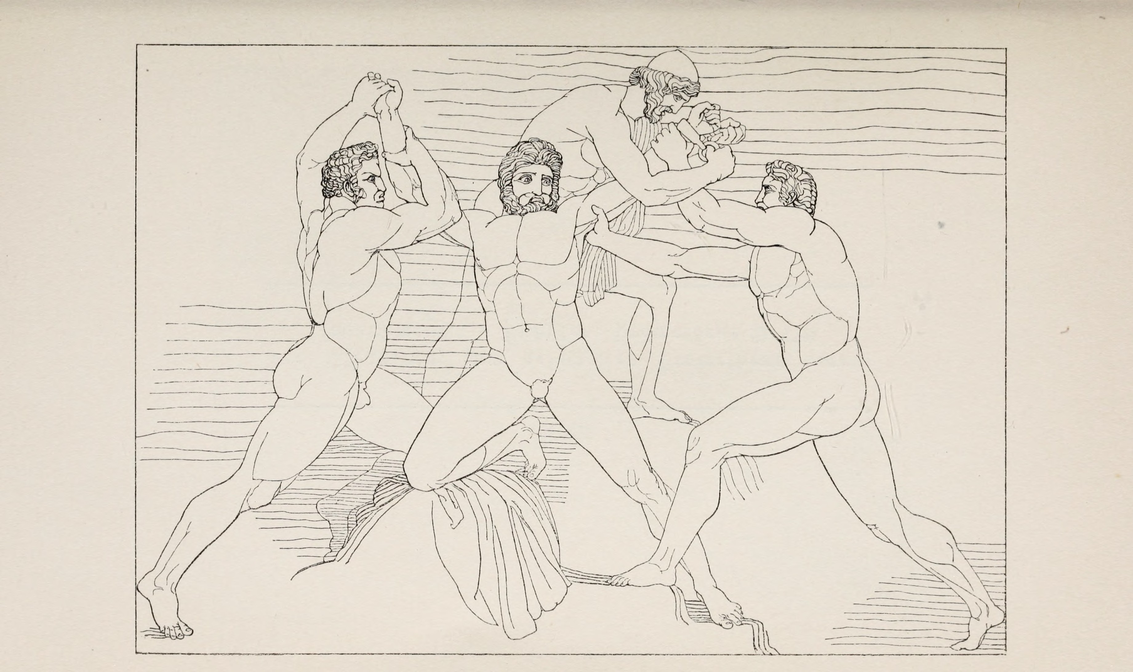 Hephaistos mit Kratos und Bia, Prometheus fesselnd. – Äschylos, Prometheus V. 56. Schwab, Sagen des klassischen Altertums I. 6.